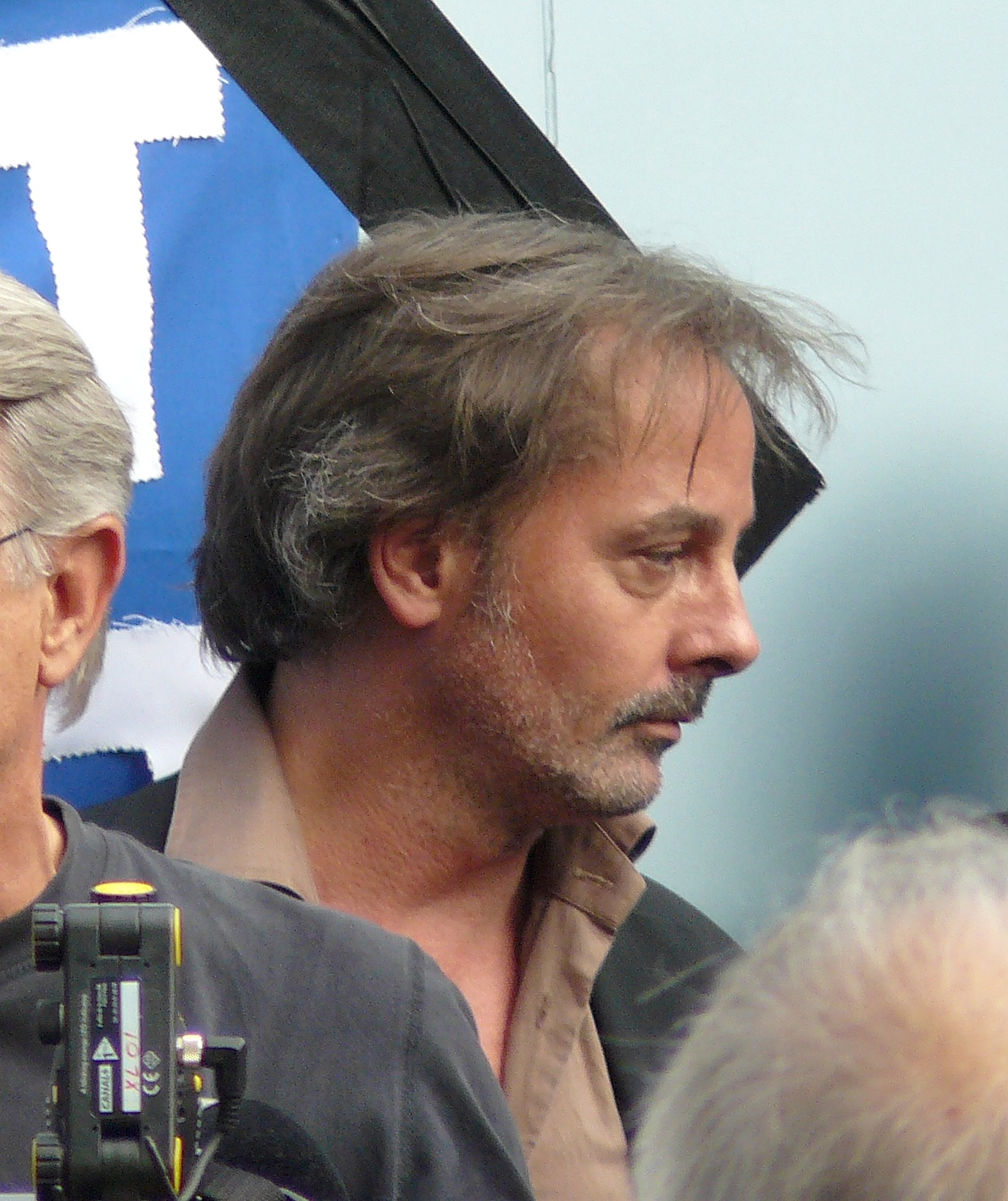 L'humoriste Christophe Alévêque devant la Maison de la Radio à Paris, le 1er juillet 2010, lors du rassemblement de protestation contre les licenciements de Stéphane Guillon et Didier Porte des ondes de France-Inter.